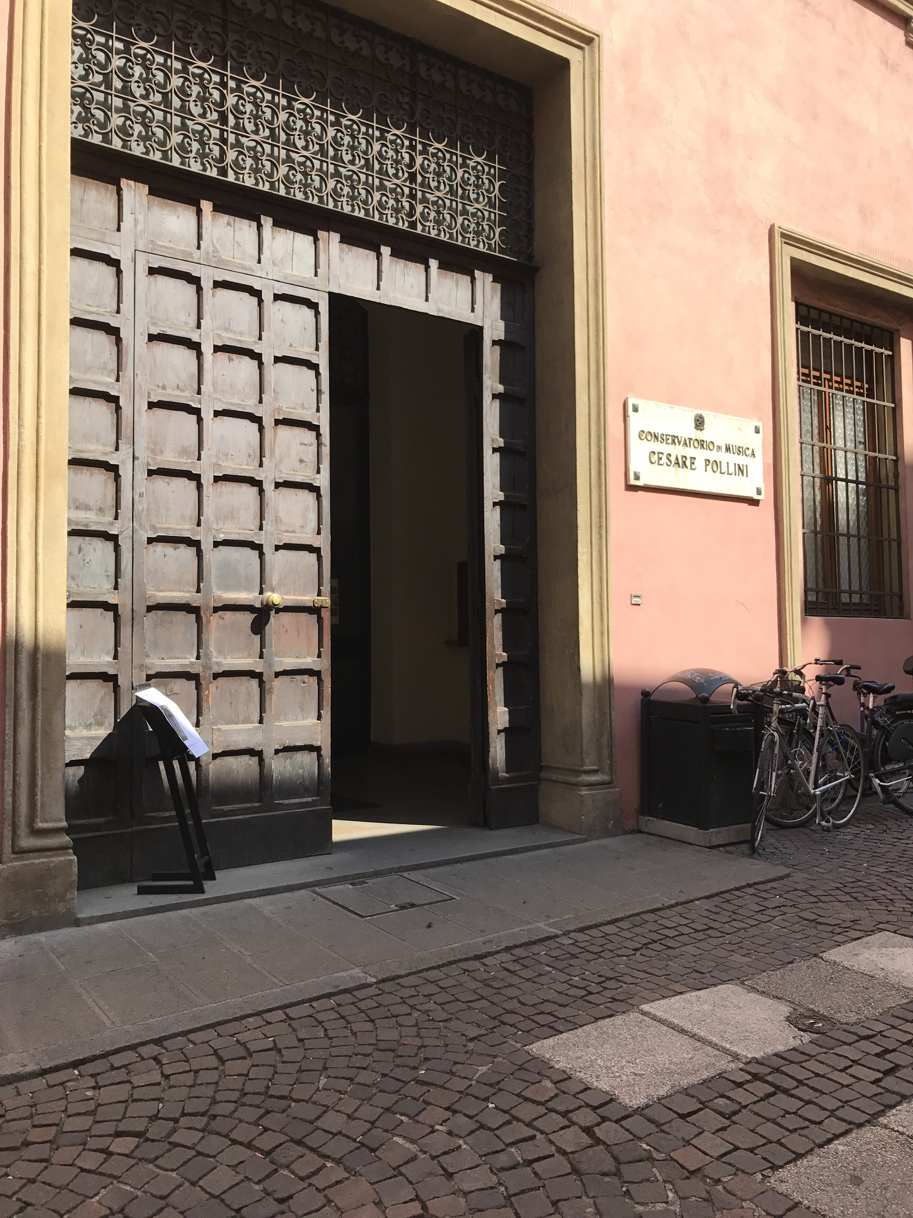 Portal del Conservatorio de Música "Cesare Pollini" de Padua (Italia), via Eremitani 18